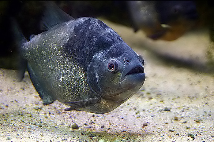 Motiv: Schwarzer Piranha (Pygocentrus piraya)